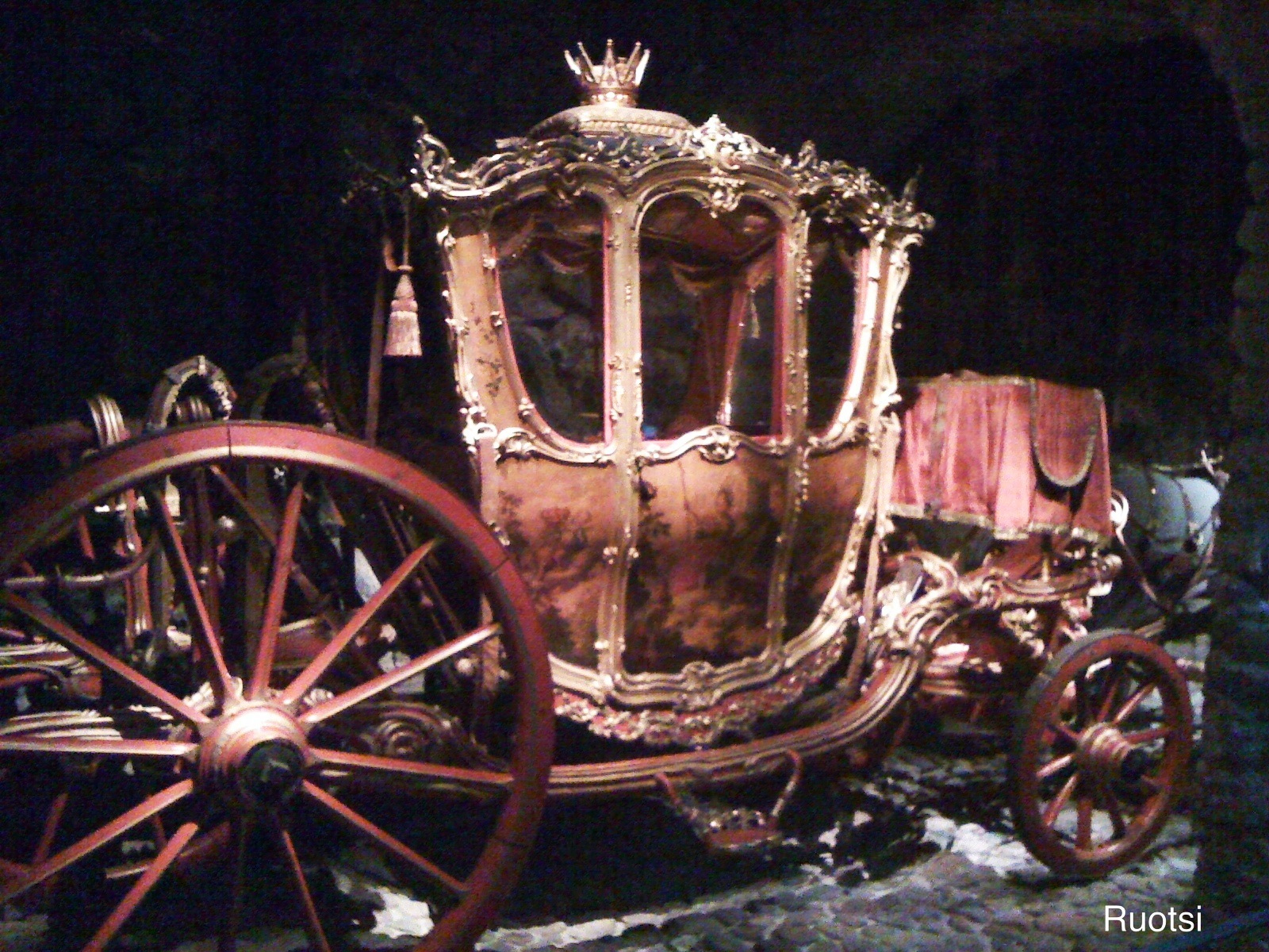 Livrustkammaren, Stockholm